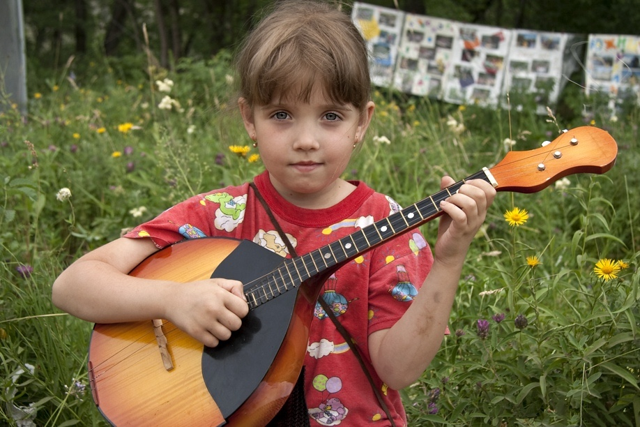 Грушинский фестиваль, Самарская область, Россия